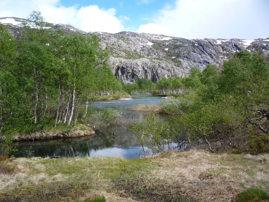 Fjellbjørkeskog i Kvanndalen landskapsvernområde.